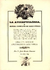 Jose Maria Tenorio Herrera